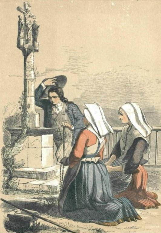 Plougastel : Femmes priant au pied d'un calvaire (dessin d'Hippolyte Bellanger, 1844, publié dans "La Bretagne" par Jules Janin